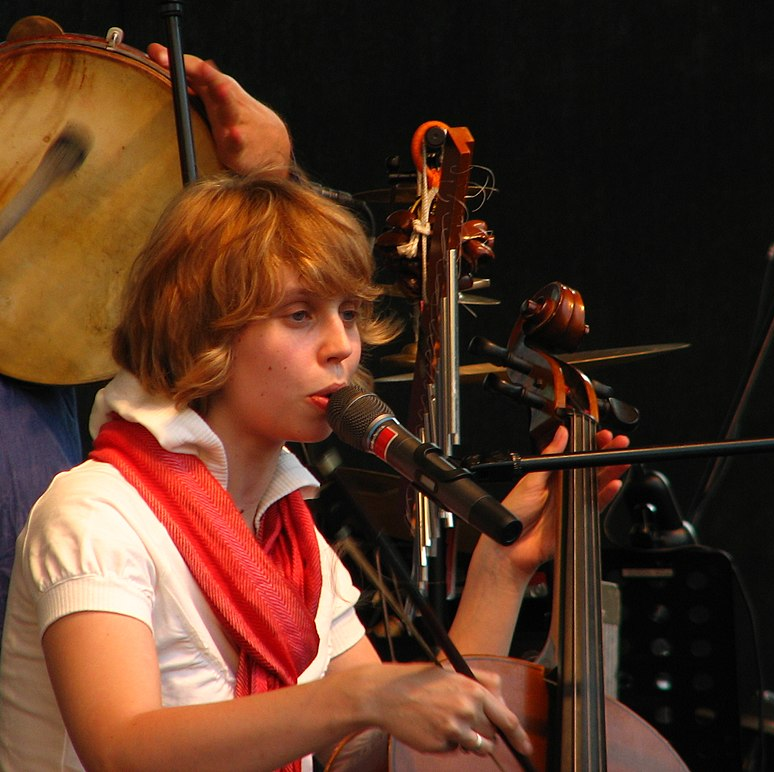 Występ Kapeli ze Wsi Warszawa na festiwalu Rozstaje w Krakowie, widoczni członkowie zespołu: Maciej Szajkowski i Maja Kleszcz.